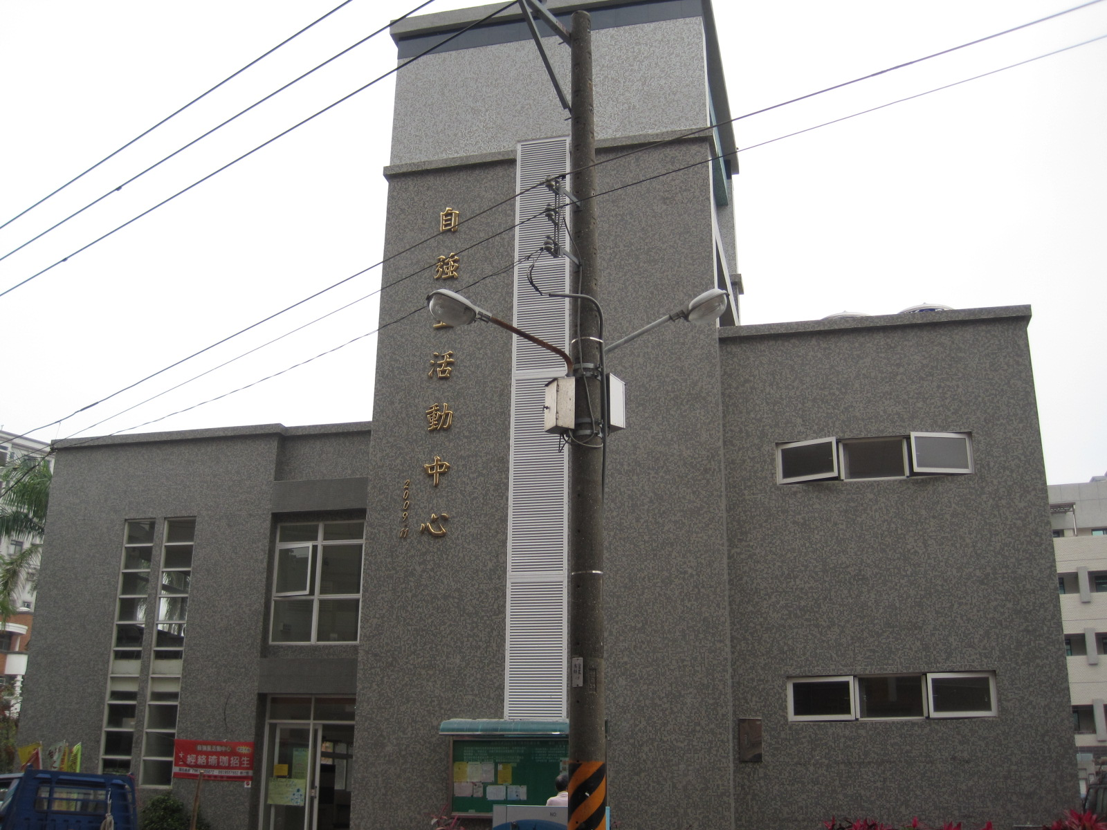 臺南市東區自強里活動中心